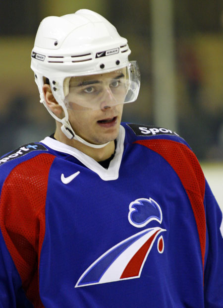 Sacha Treille